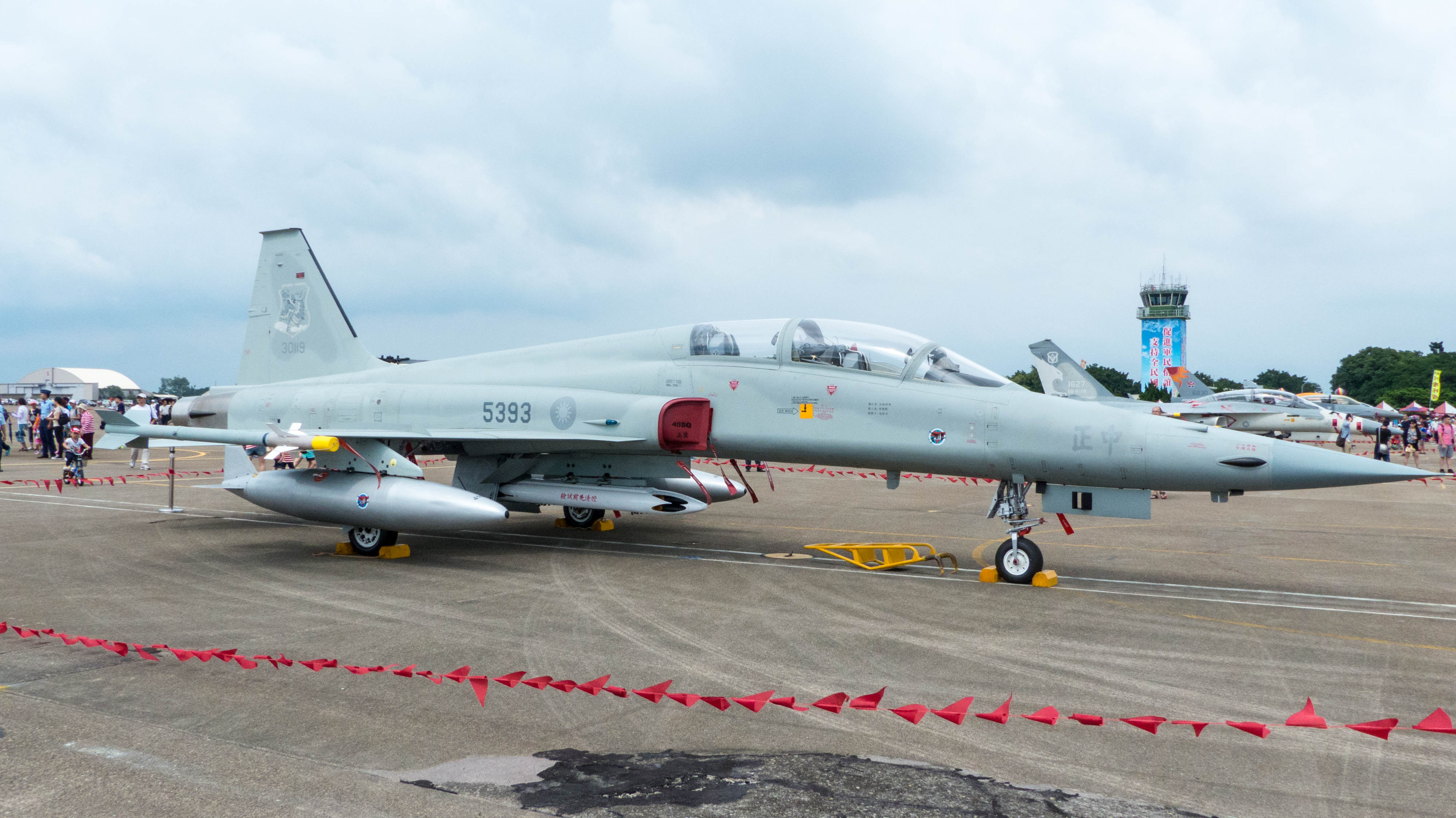 2014年空軍清泉崗基地開放活動，停機坪靜態展示的F-5F 5393右側。